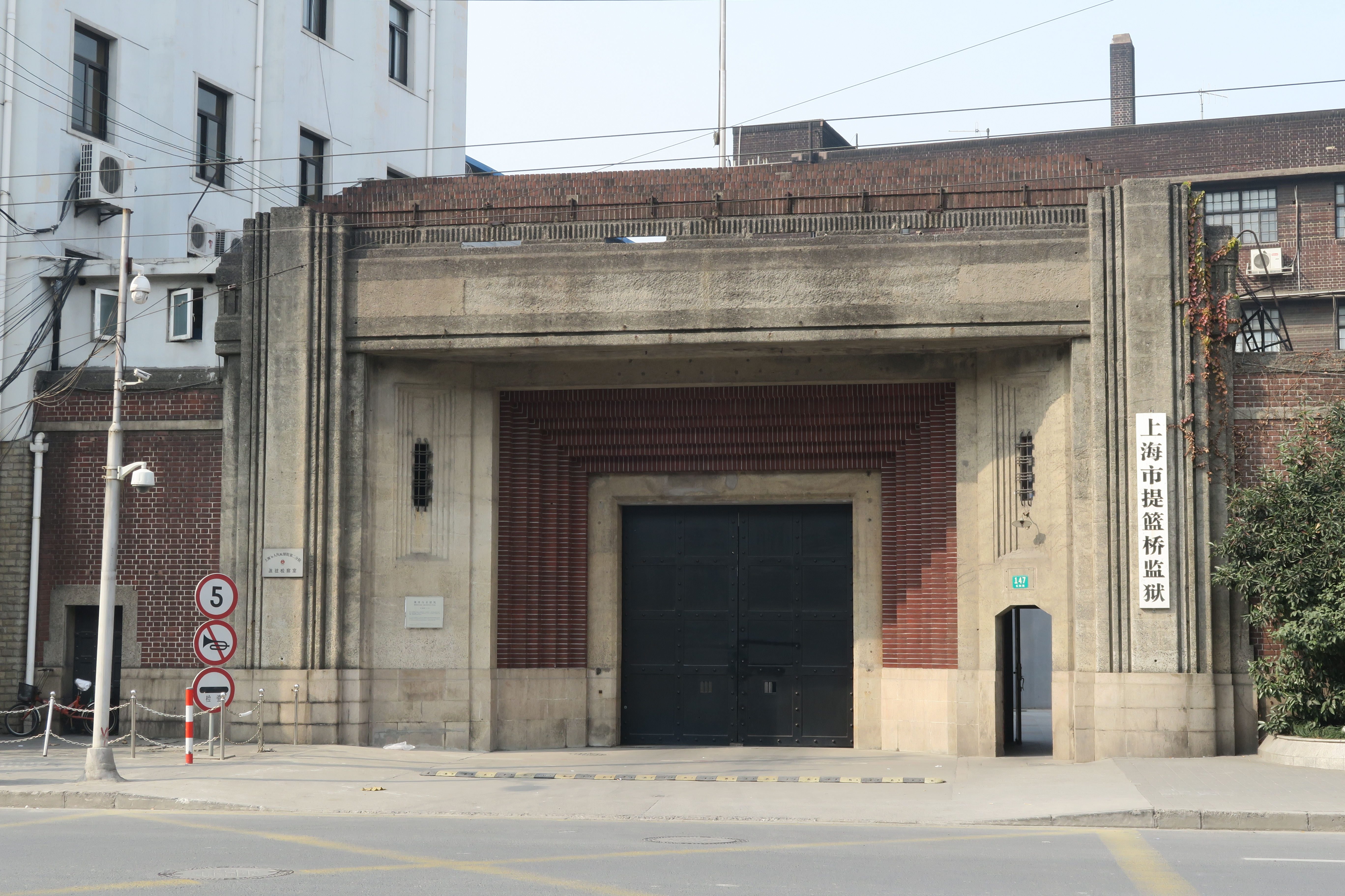 提篮桥监狱大门现状